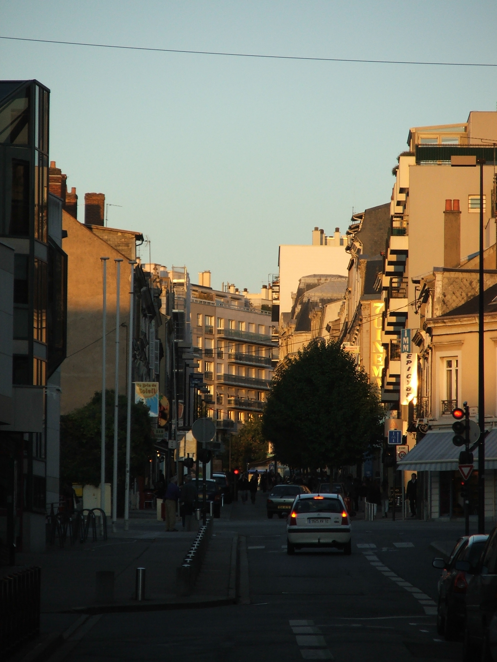 La rue du port au Mans vue en contrebas, dans le quartier des Halles, un soir d'automne au soleil couchant.